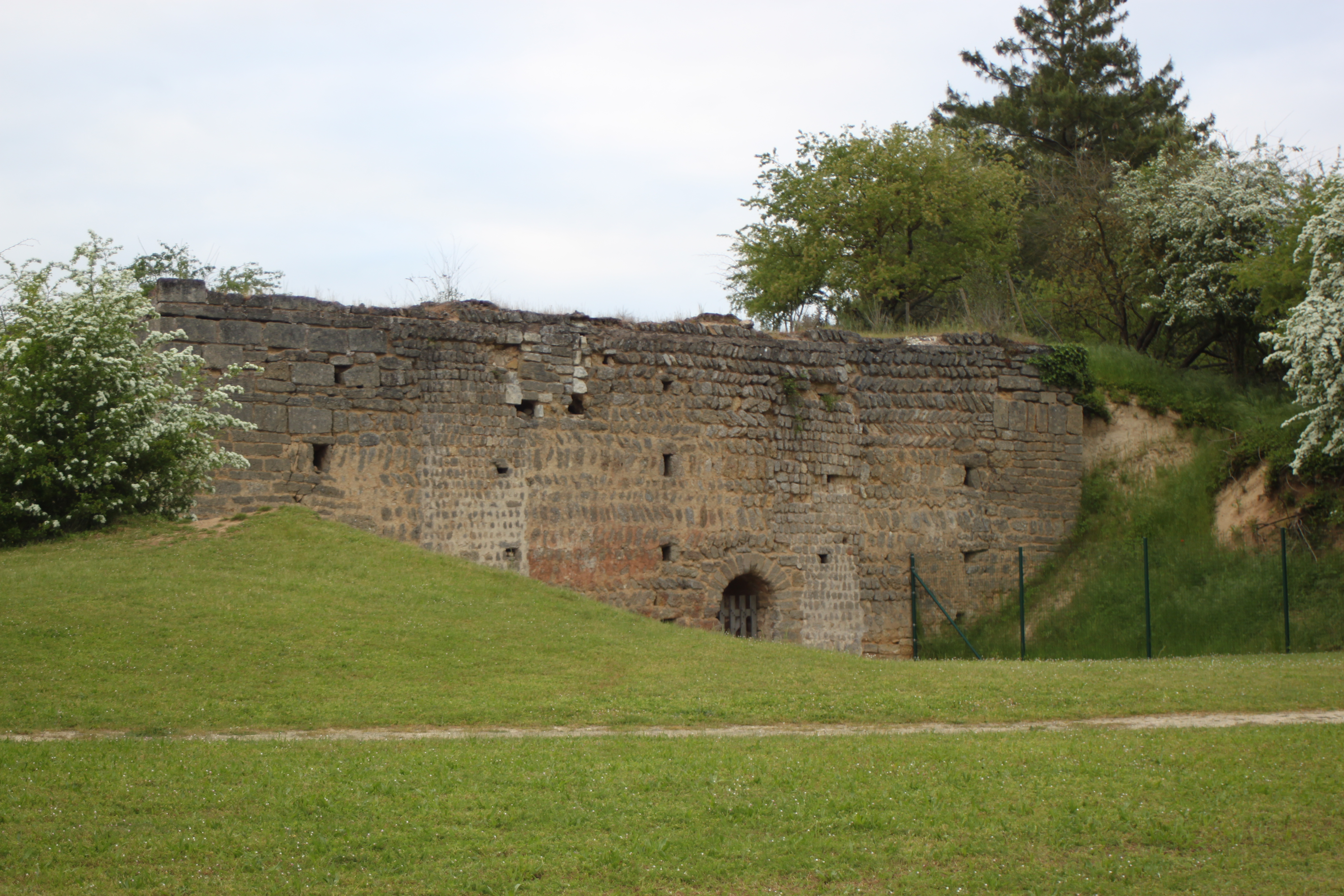 Motte carolingienne, Fr-49-Doué-la-Fontaine.